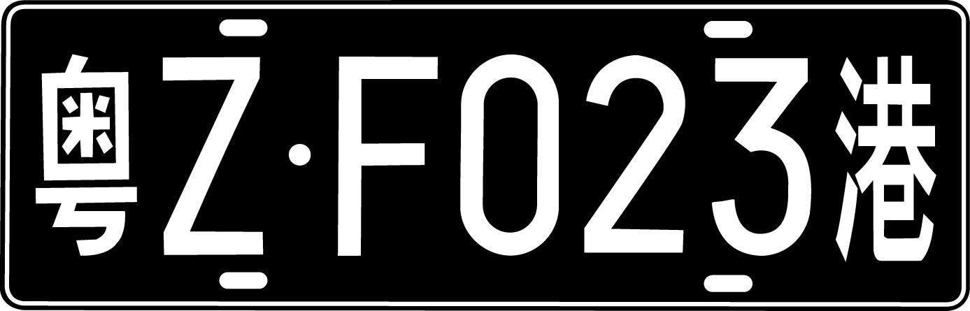 C.6 港澳入出境车号牌 C.6.1 香港入出境车号牌